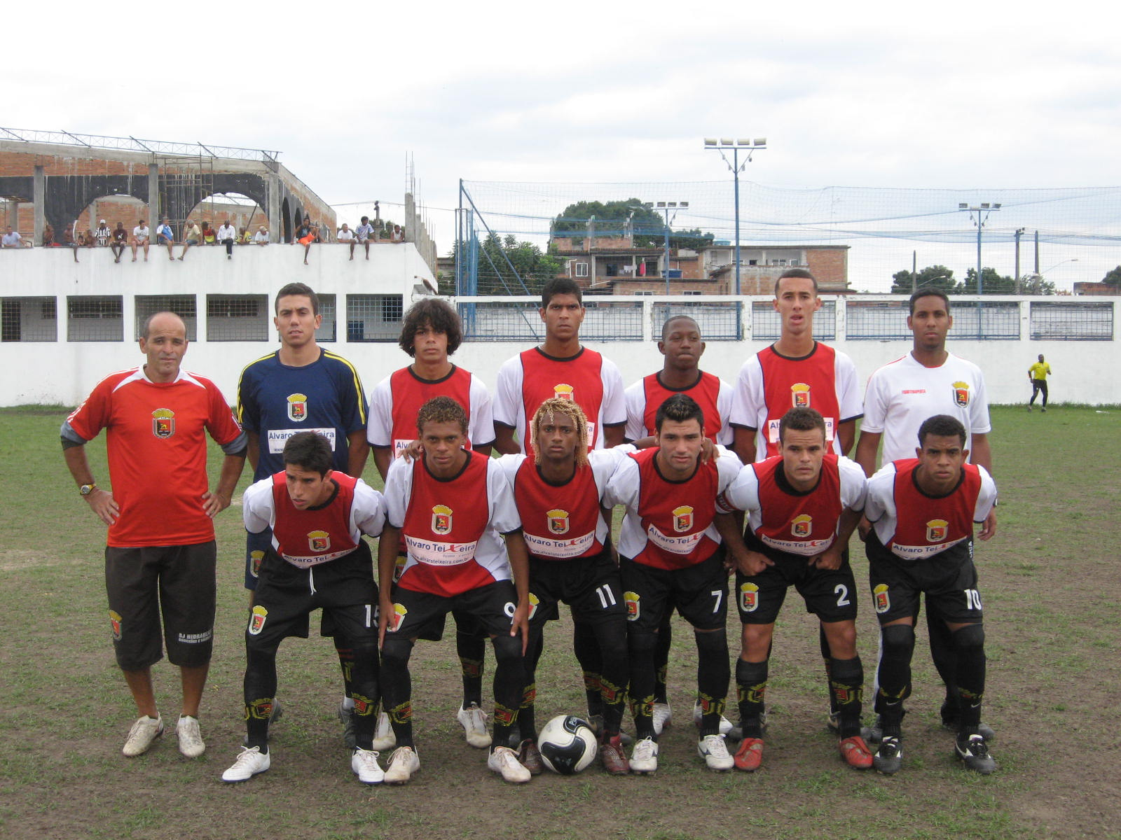 Equipe do Esporte Clube Marinho, da Terceira Divisão Carioca, perfilado em 2009.